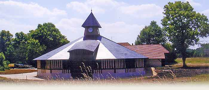 Photo du conservatoire des meules et pavés du bassin d'Epernon